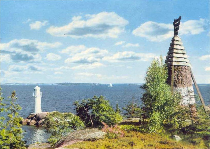 Kapellskärsskäret med stångmärke och Kapellskärs fyr.